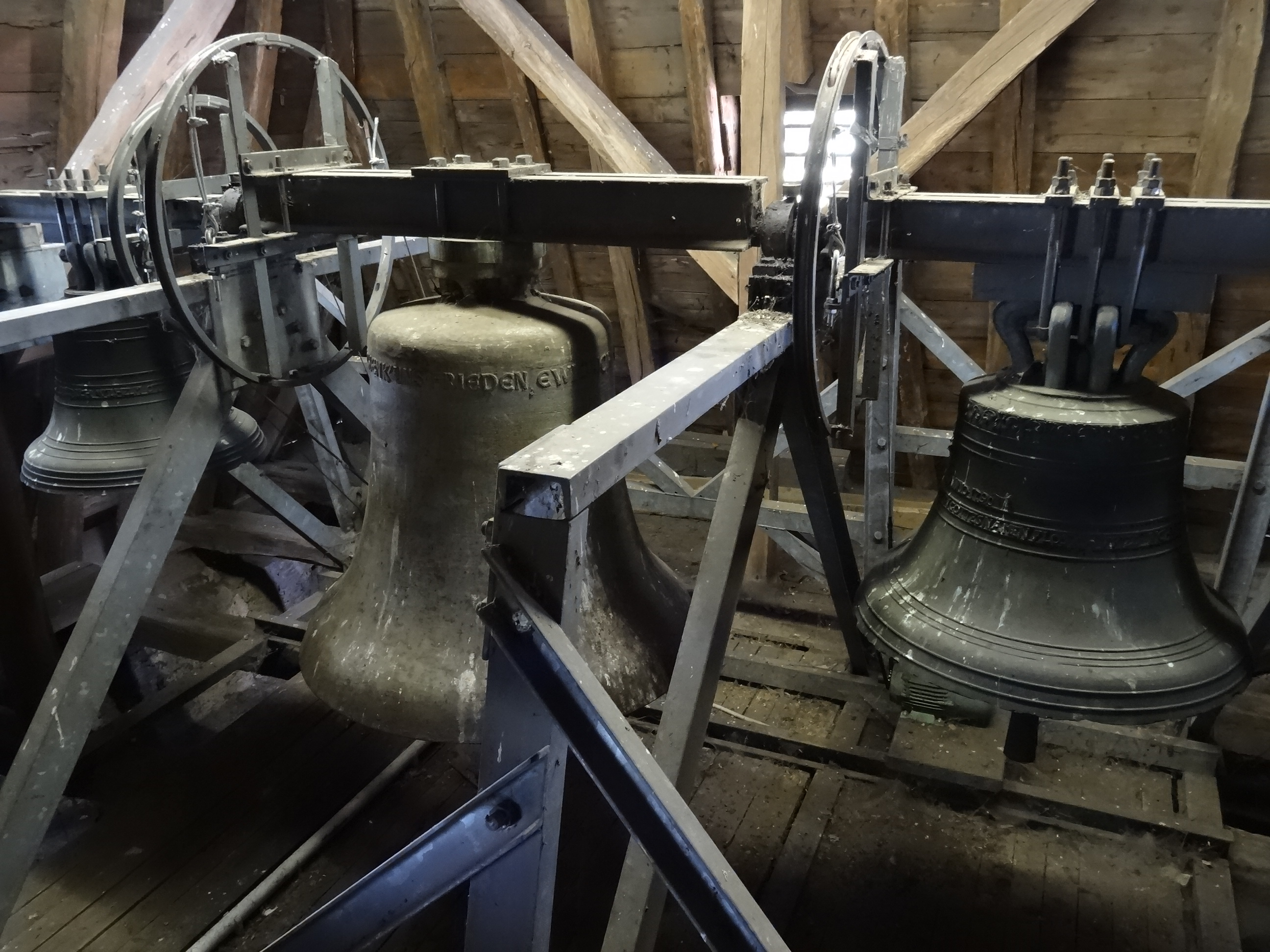 Evangelische Kirche Nieder-Bessingen